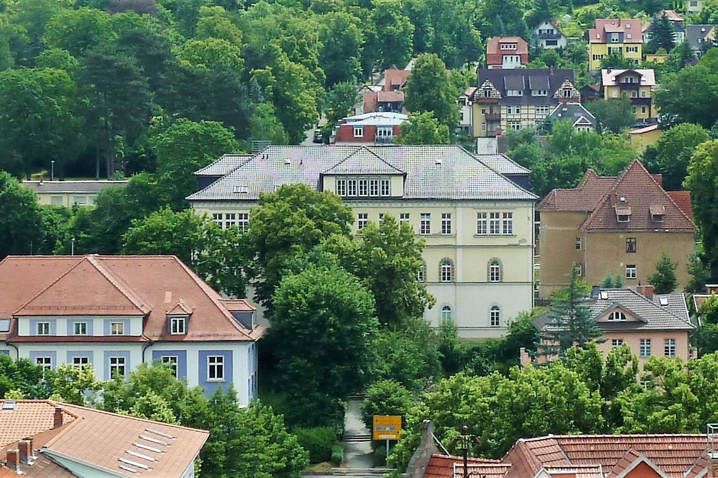 1832 erbautes ehemalige Georgenkrankenhaus (Bildmitte) in Meiningen (bis 1903), anschließend Höhere Mädchenschule, 1963—1997 Henfling-Gymnasium, heute Schulgebäude